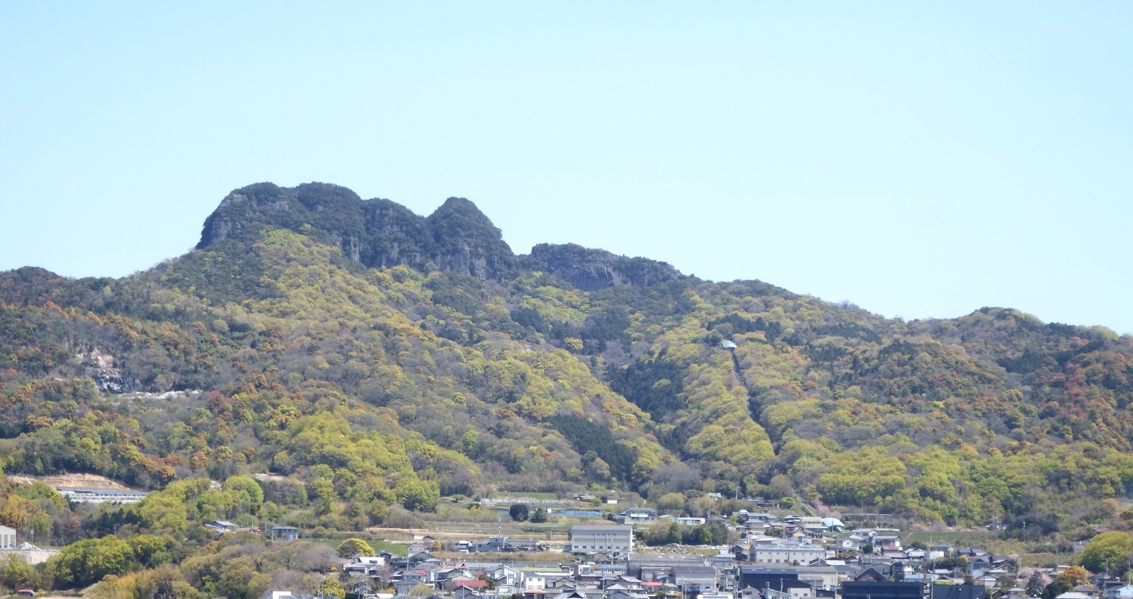 五剣山を西方から臨む